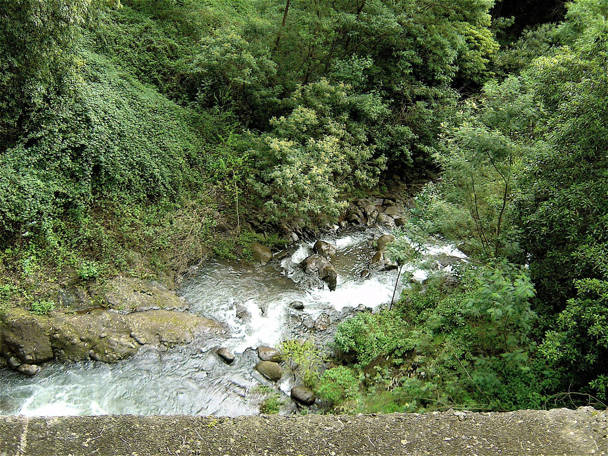 Wanderung auf der Levada dos Tornos vonMonte aus